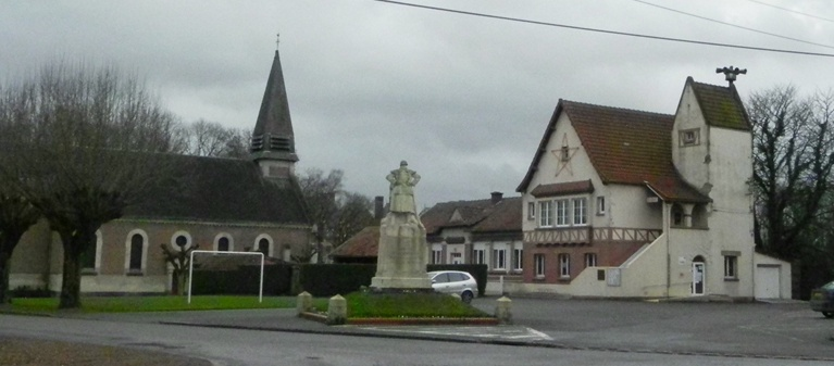 La place